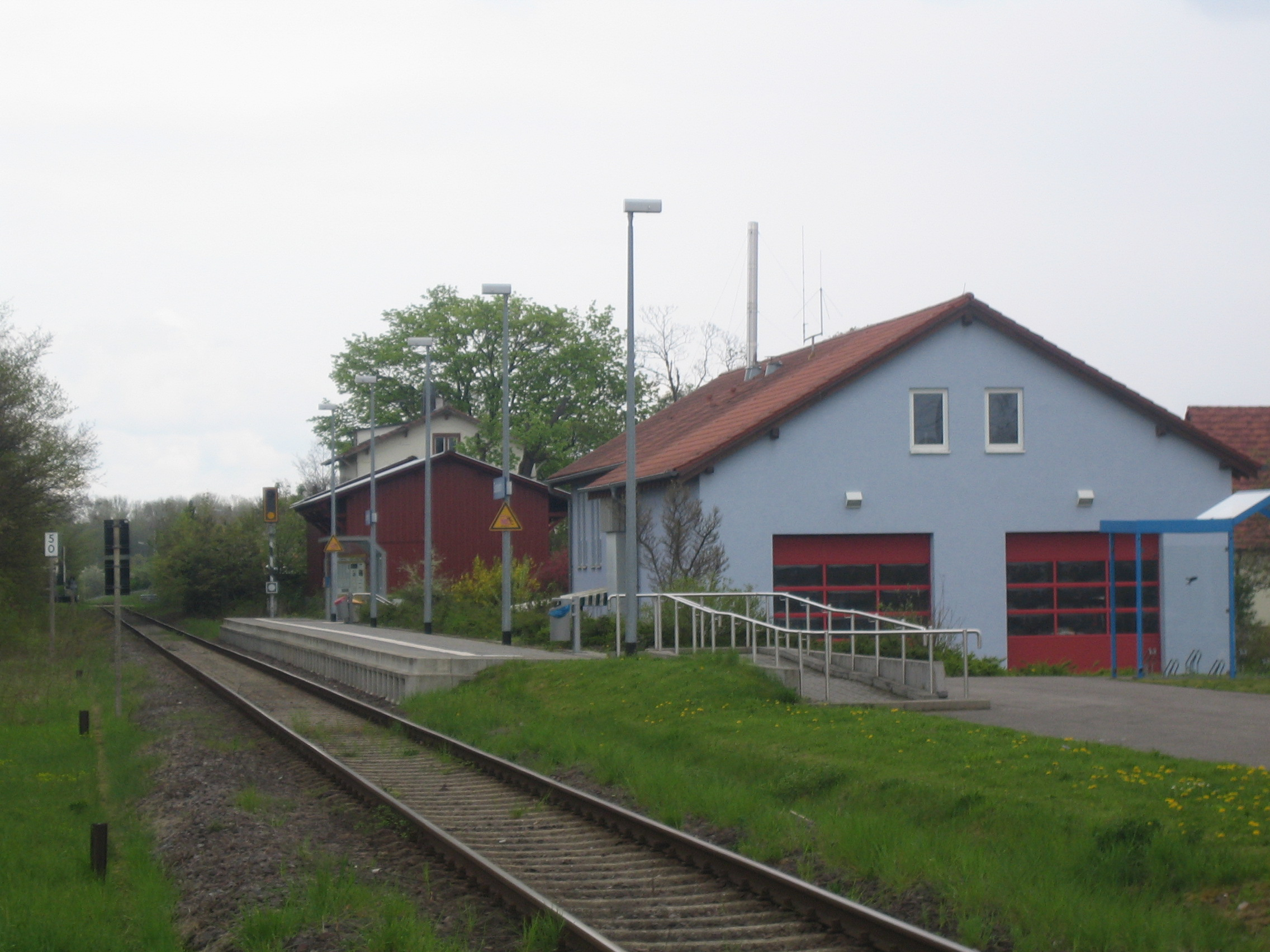 Haltepunkt Barbelroth